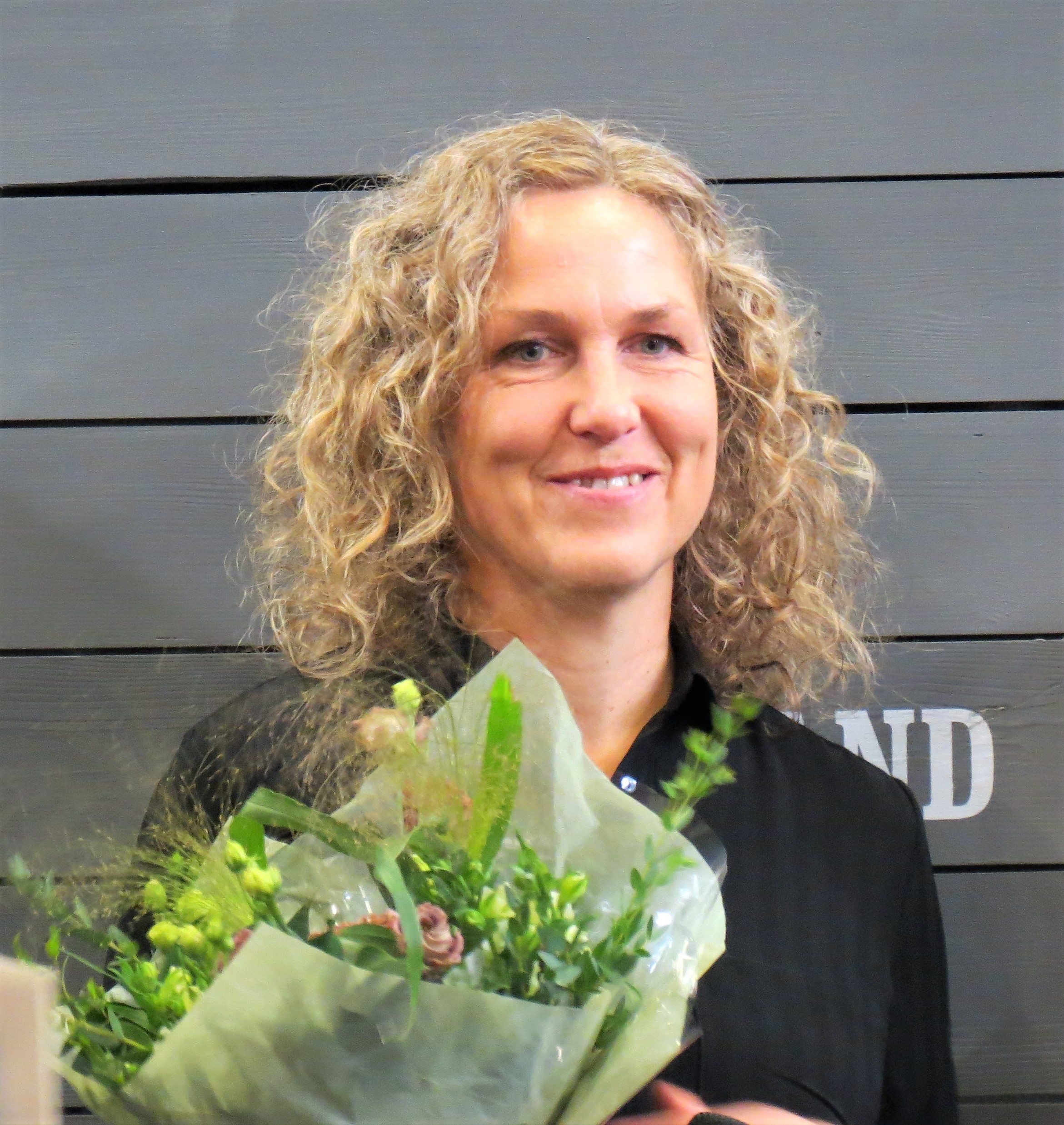 Marit Kapla efter att ha utsetts till en av Region Värmlands två litteraturstipendiater vid Bokmässan Göteborg i september 2019.